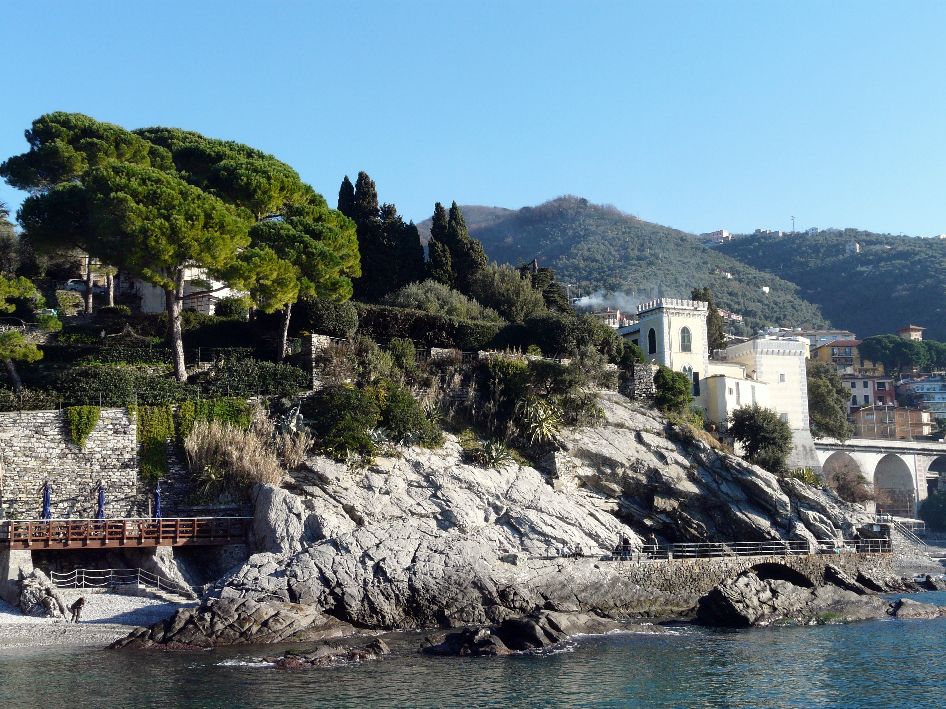 Il Castello Canevaro, Zoagli, Liguria, Italia